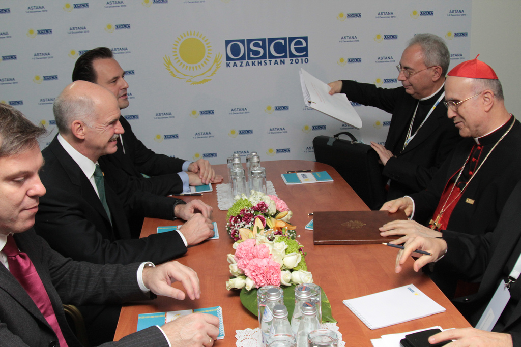 Au cours du sommet de l'OSCE à Astana en 2010, le Premier minsitre grec, George Papandreou, accompagné par Dimitrios Droutsas, ministre des affaires étrangères (à sa gauche), rencontre le cardinal Tarcisio Bertone, secrétaire d'Etat du Saint-Siège, accompagné par Mgr Dominique Mamberti, secrétaire pour les Relations avec les Etats.